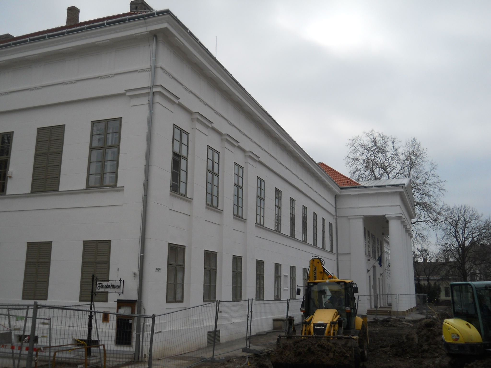 Szekszárd - régi vármegyeháza